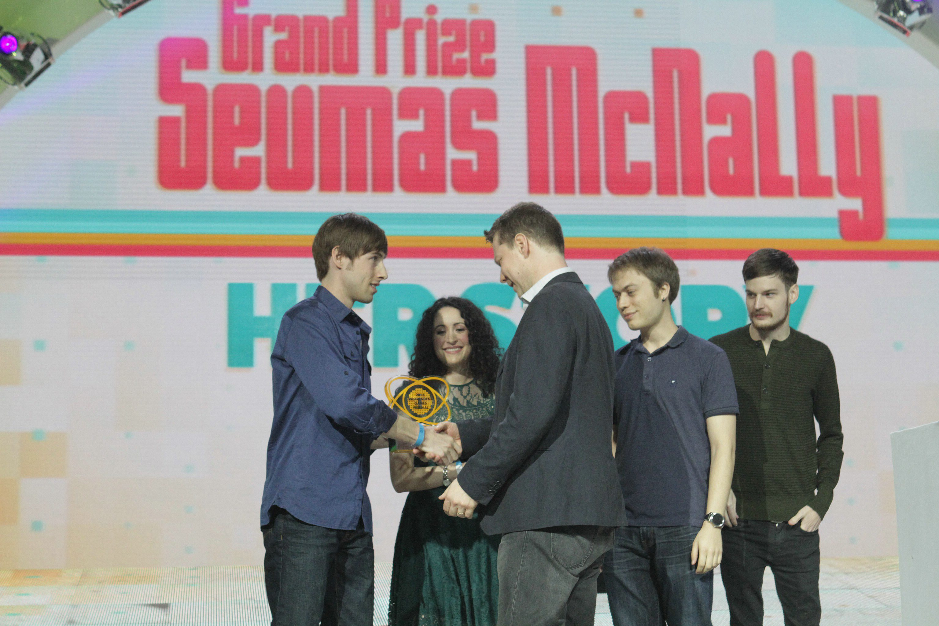 16-19_27_38-01-7D2_0066